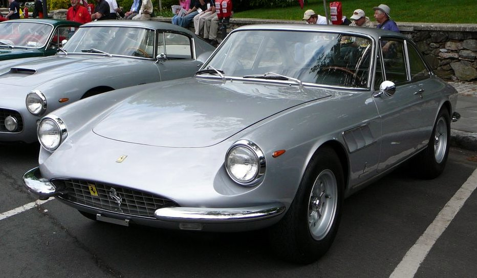 Ferrari 330 GTC.